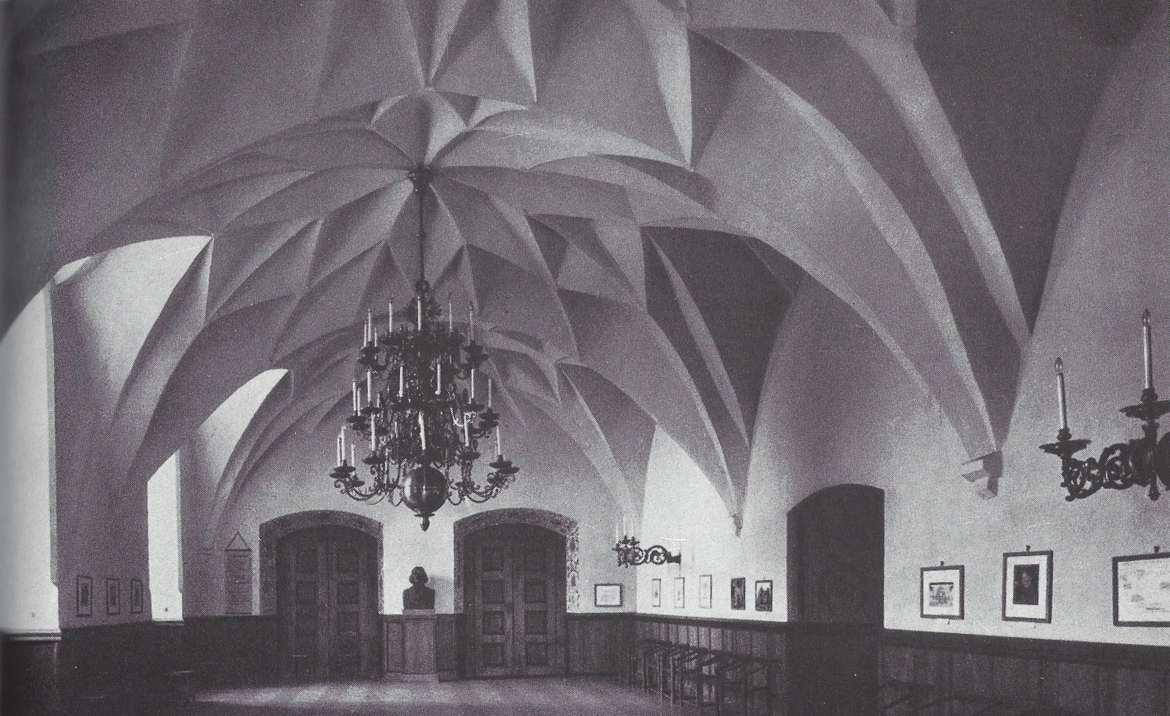 Saal und Gewölbe in Schloss Allenstein.